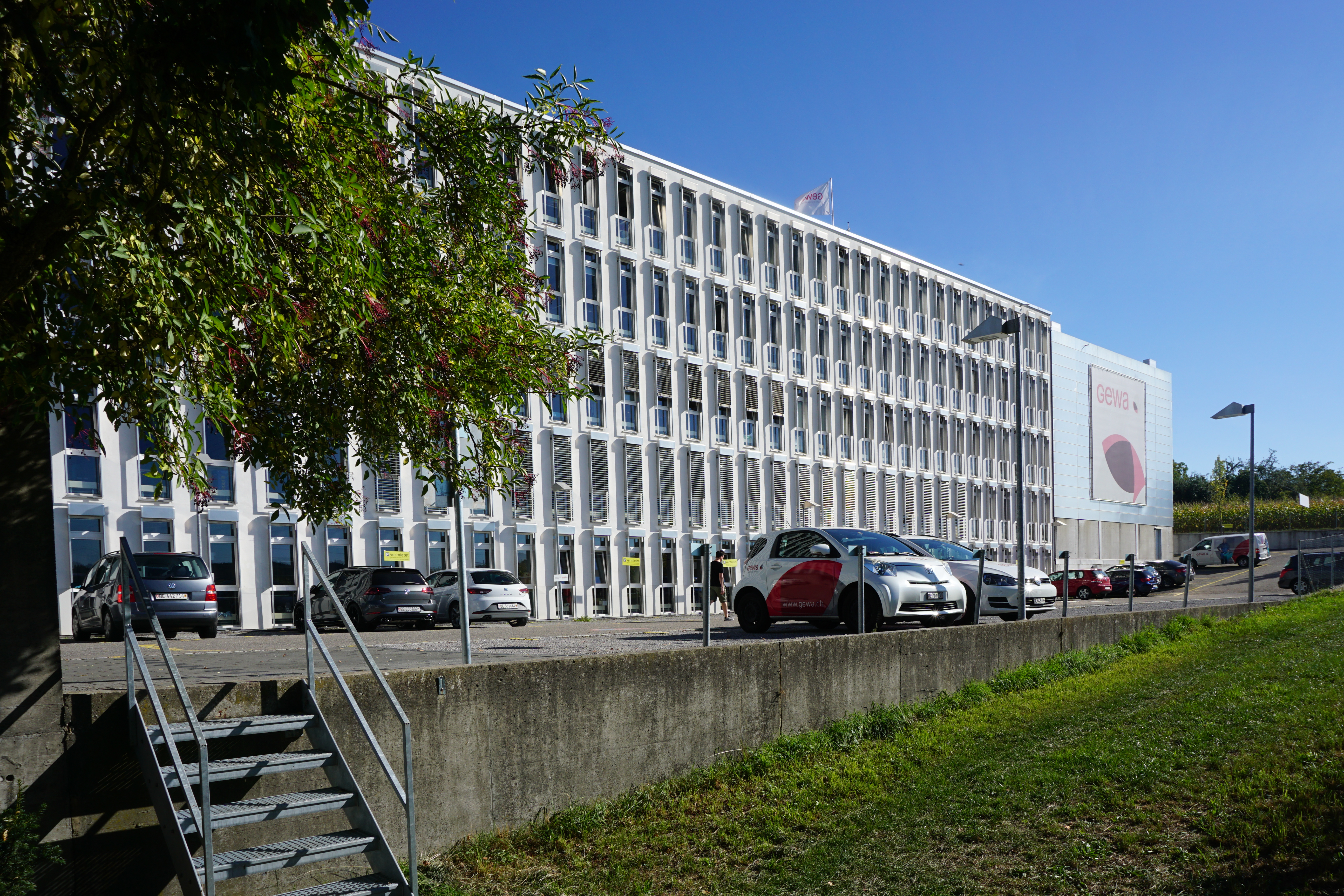 GEWA Stiftung für berufliche Integration